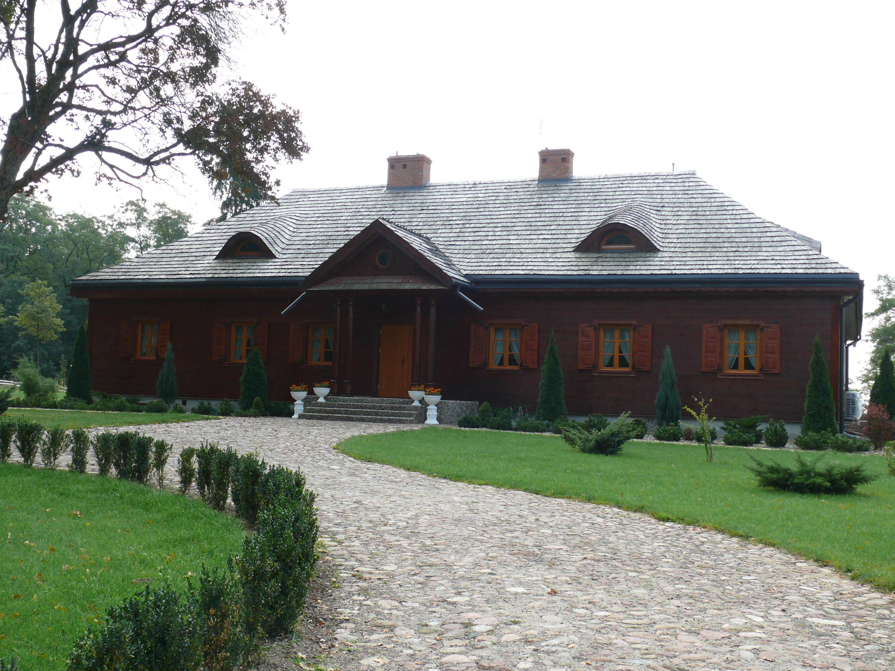 Dwór drewniany (XIXw.) w zespole dworskim (front) - Woskrzenice Duże, powiat bialski, gmina Biała Podlaska, woj. lubelskie (Zabytek nr.A-176 z 28.03.1989)